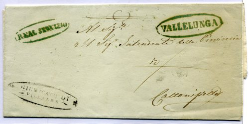 Foto proveniente da collezione personale dell'autore raffigurante un timbro della franchigia del Real Servizio